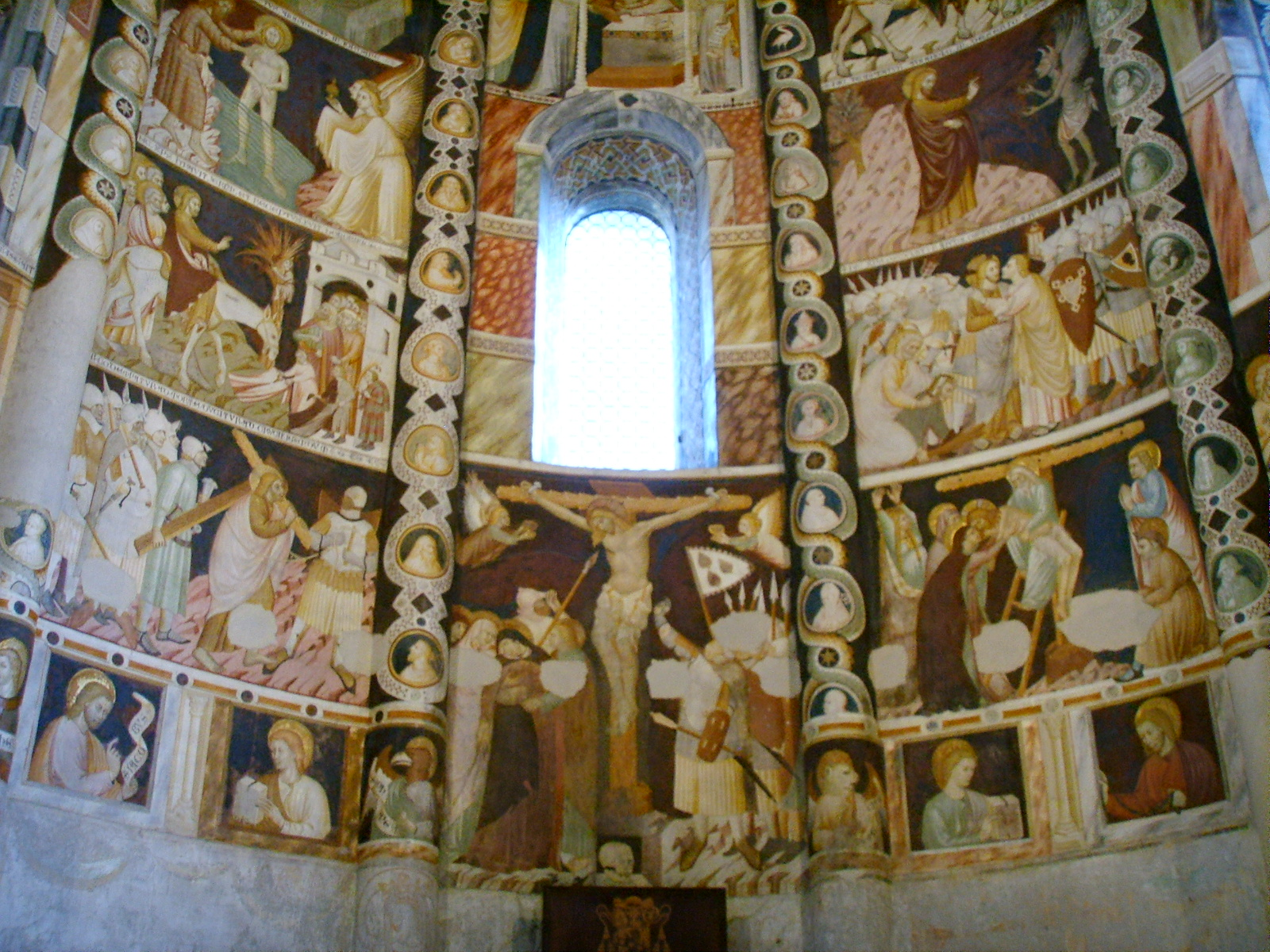 Como, basilica di sant'abbondio, cortile, interno, affreschi